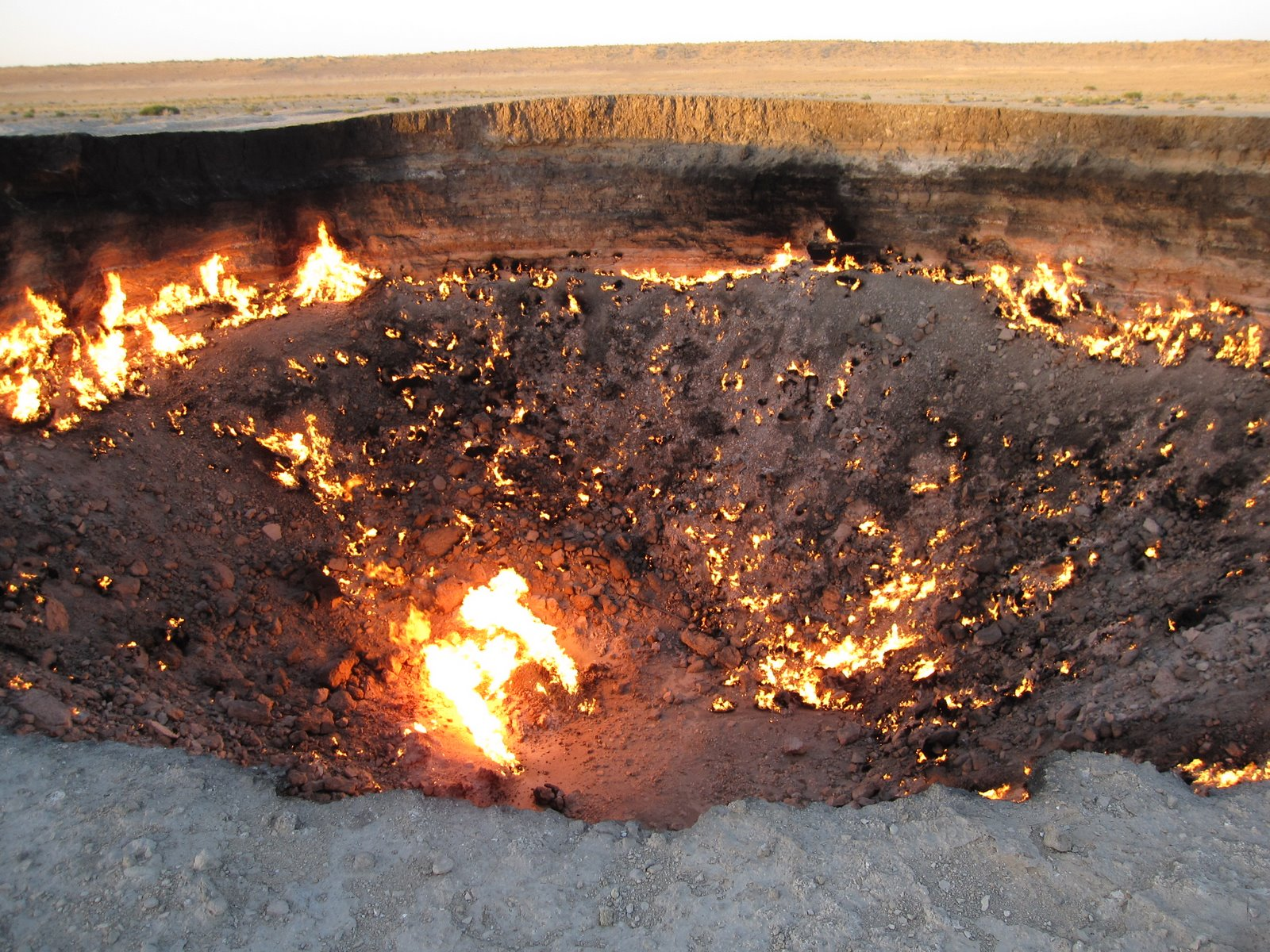 Darvaza Gas Crater